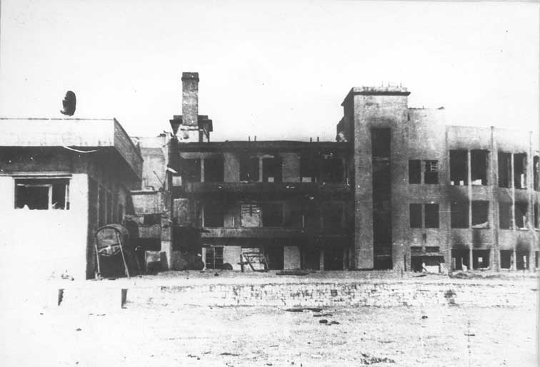 Клуб имени Ленина - такой, каким его увидели освободители